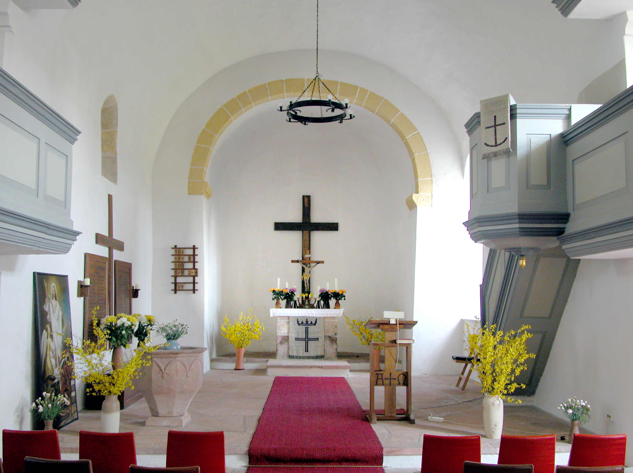 06.04.2010 04703 Altenhof (Bockelwitz (Leisnig)), Altenhof 17 (GMP: 51.168215,12.981032): Romanische Dorfkirche, vermutlich aus dem späten 12. oder frühen 13. Jahrhundert. Altarraum, Apsis. In den 1980er Jahren erfuhr der Altarraum eine Umgestaltung, bei der die romanischen Elemente betont wurden. Das 1897 aufgestellte Altarbild mit der Auferstehung Christi wurde abgenommen. Es steht heute an der Chorwand. [DSCN40819.TIF]20100406280DR.JPG(c)Blobelt